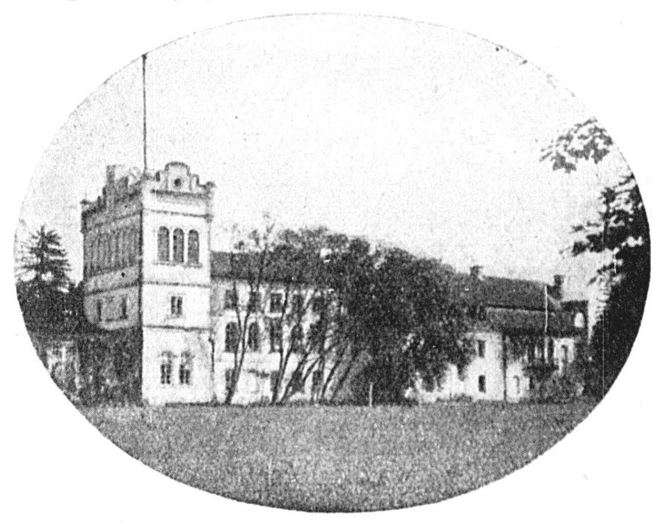 Беларуская (тарашкевіца): Дзявяткавічы (Dziaviatkavičy), сядзіба Сьлізняў (Ślizień)